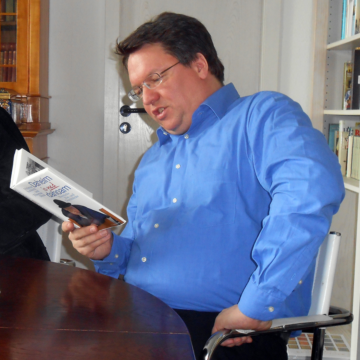 Helmut Schleich bei der Lesung zu seinem Buch: "Daheim is net dahoam"